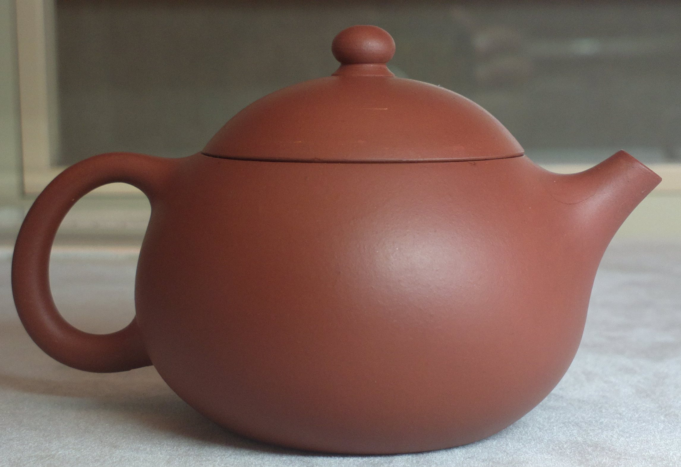 Théière Xishi en argile de Yixing ou glaise zisha par Xu Xu. Exposition au Centre culturel de Chine à Paris du 4 au 13 septembre 2013.